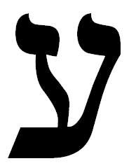 hebrew letter ayin